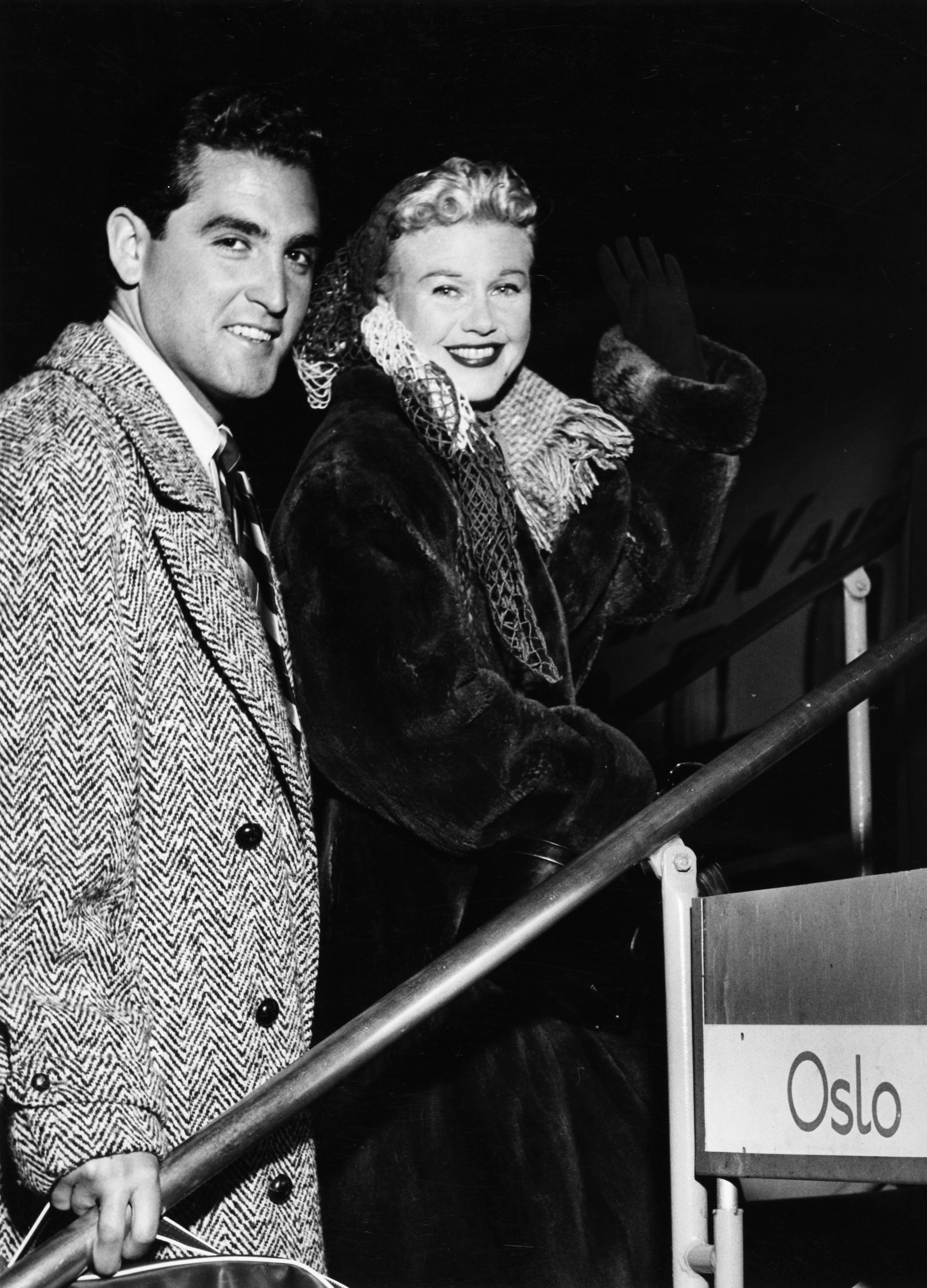 Film star Ginger Rogers and her husband Jacques Bergerac, 1950s